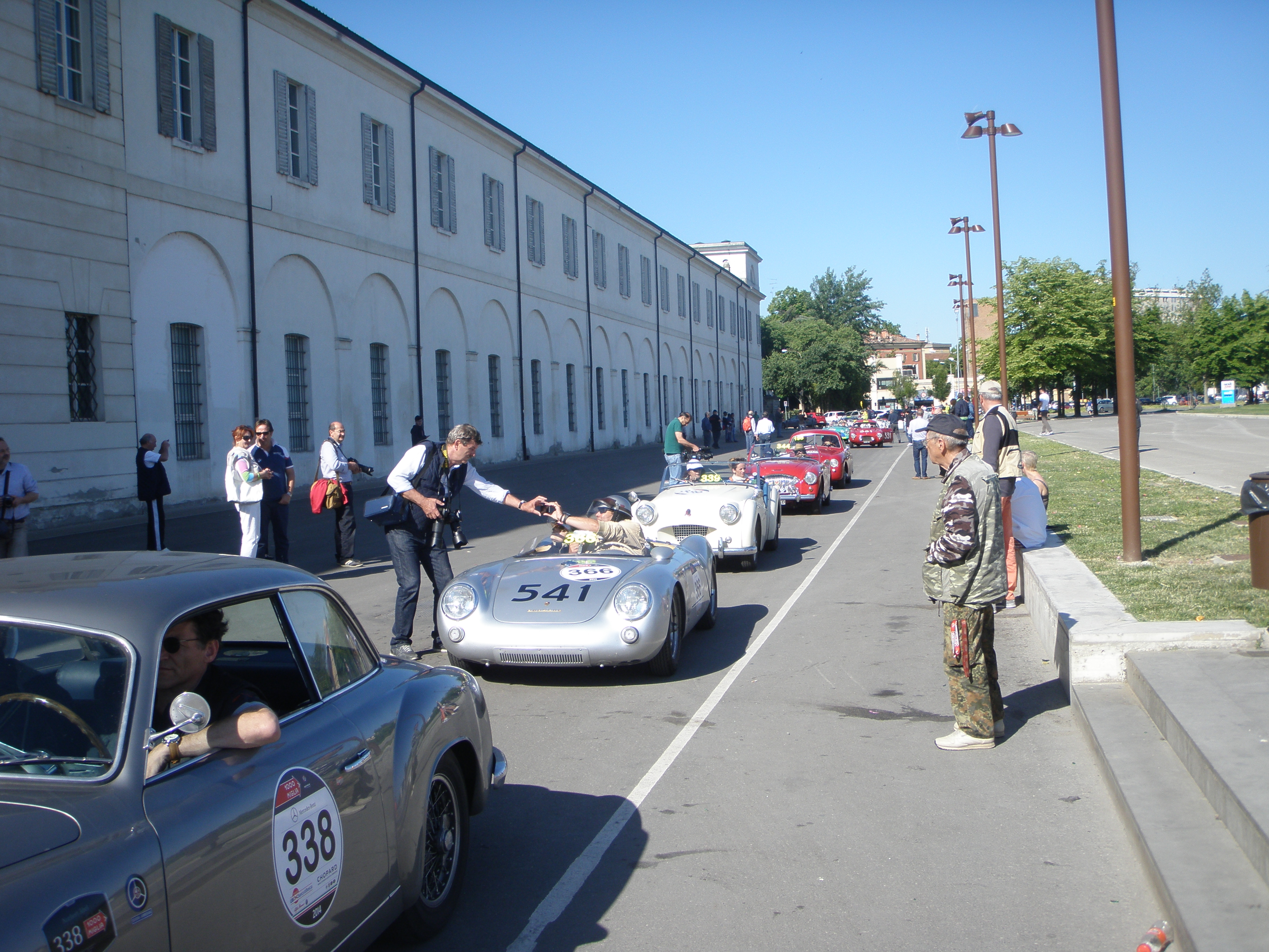 Millemiglia Parco Novi Sad